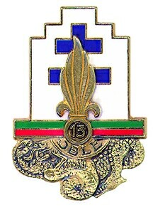 Insigne régimentaire de la 13e Demi-brigade de Légion étrangère